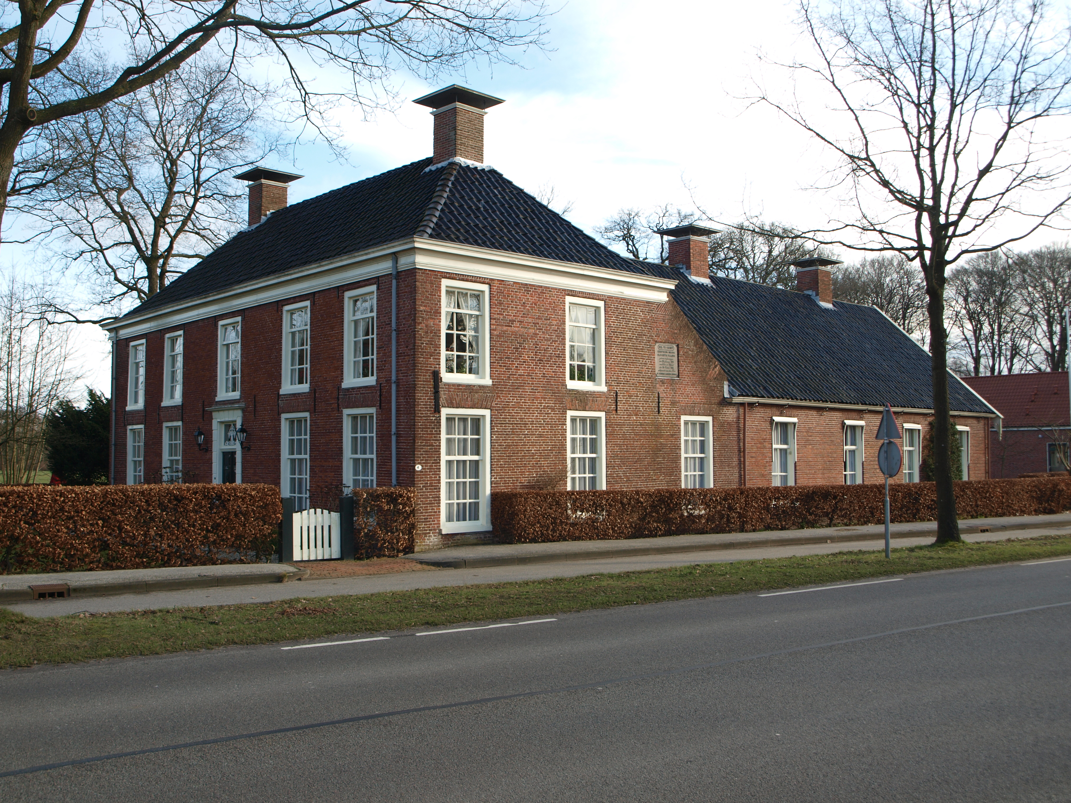 Glimmen Rijksstraatweg 4